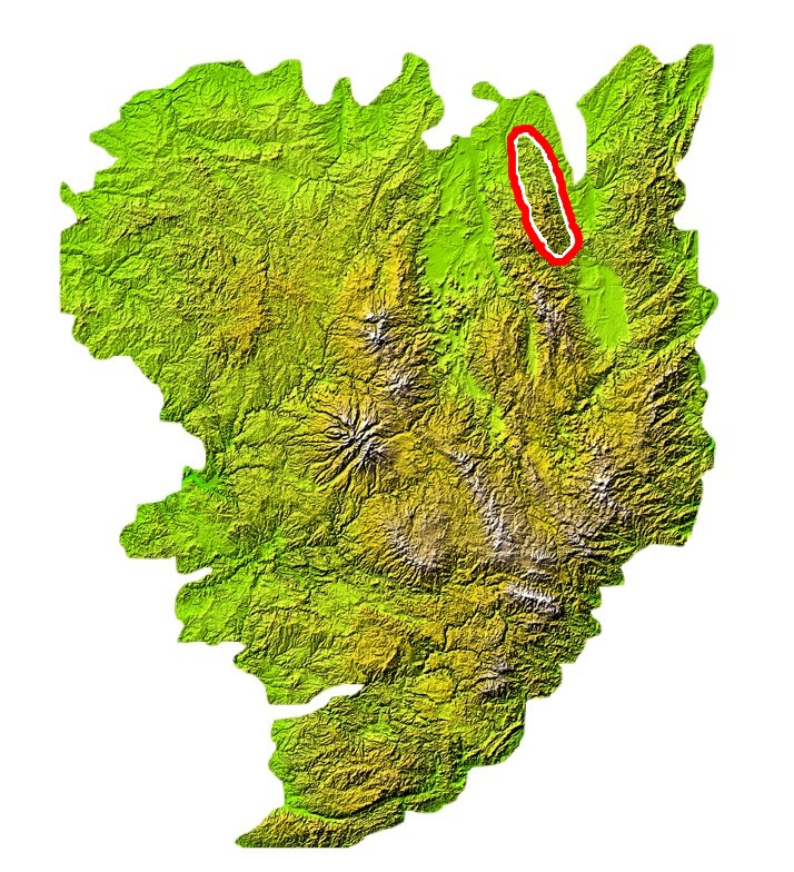 Situation des Monts de la Madeleine sur la carte du Massif central